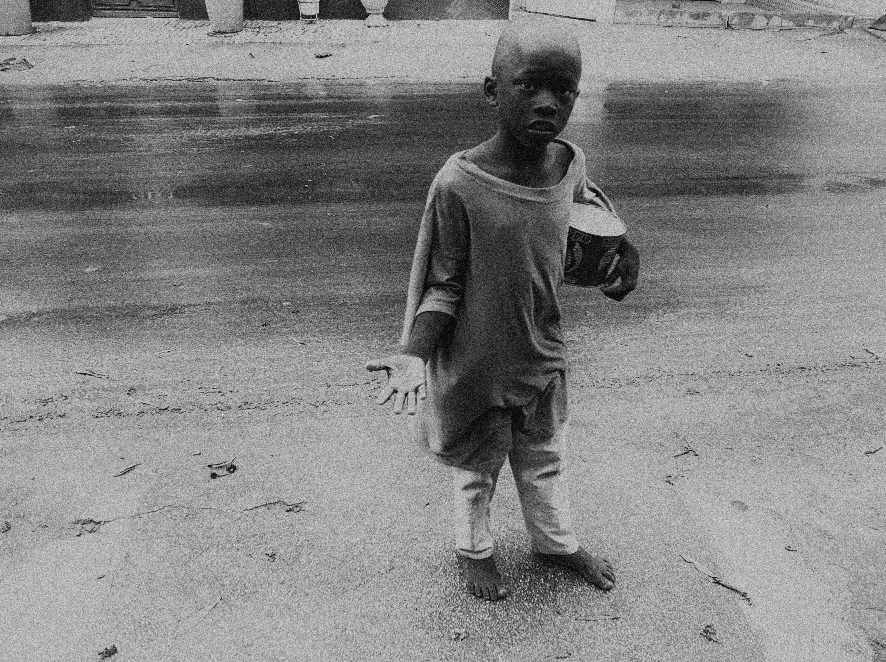 From Wikipedia Talibé